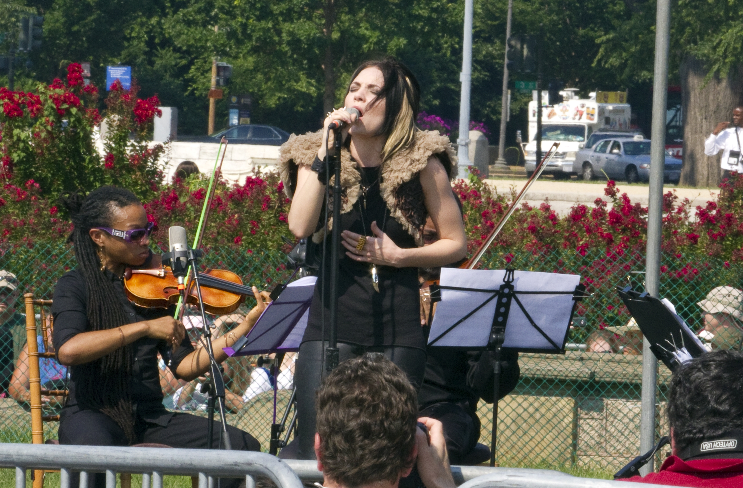 Skylar Grey chantant au Tibet Talk For World Peace à Washington.